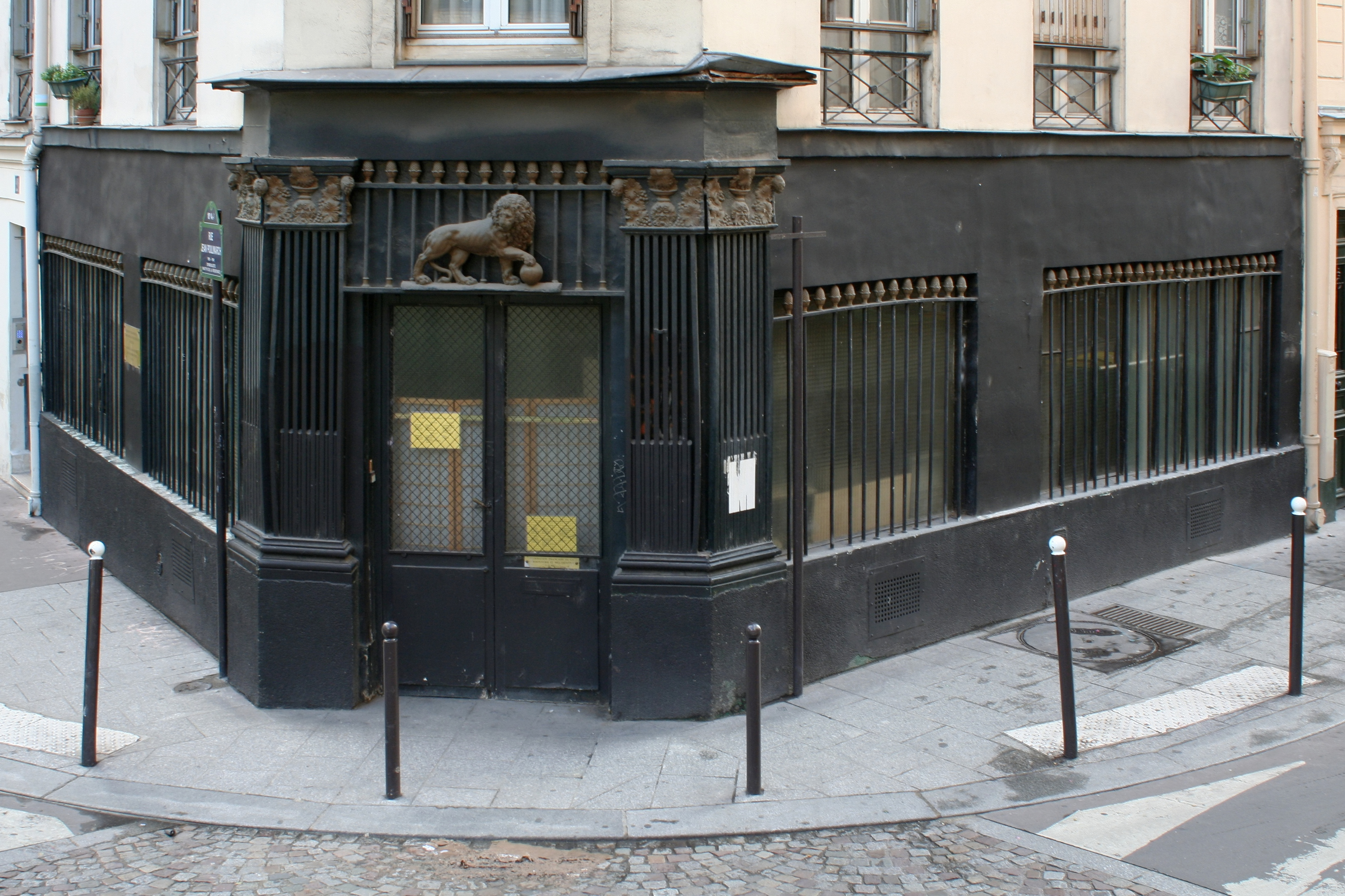 Ancien débit de boisson, devanture inscrite au titre des monuments historiques.